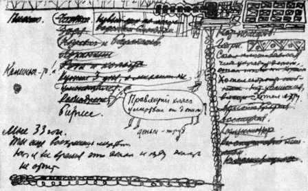 Черновые заметки к роману Ильфа и Петрова "Золотой телёнок"